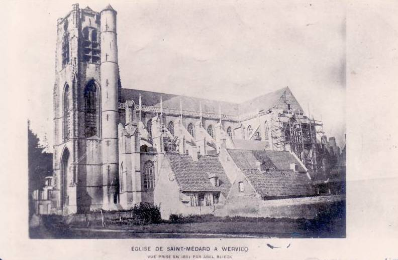 Eerste foto van de Sint Medarduskerk in Wervik door Isidore Blieck in de jaren 1890. Het doksaal wordt gebouwd en de spits is er nog niet.